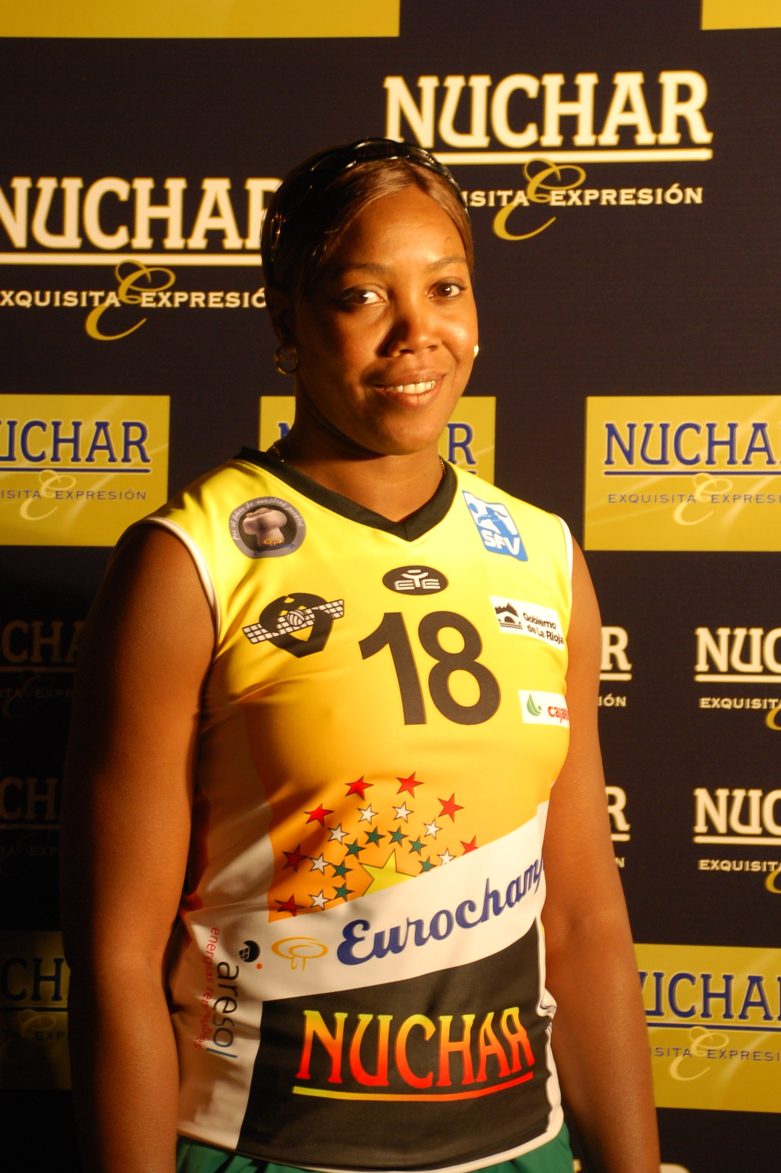 Regla Bell, jugadora cubana de voleibol